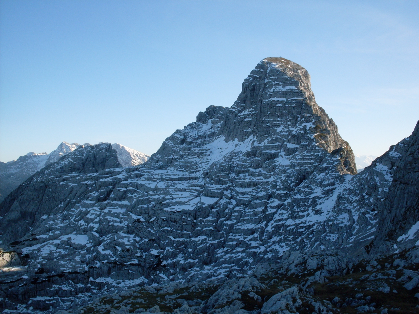 Anblick des Stadelhorns von Norden aus der Roßkarscharte